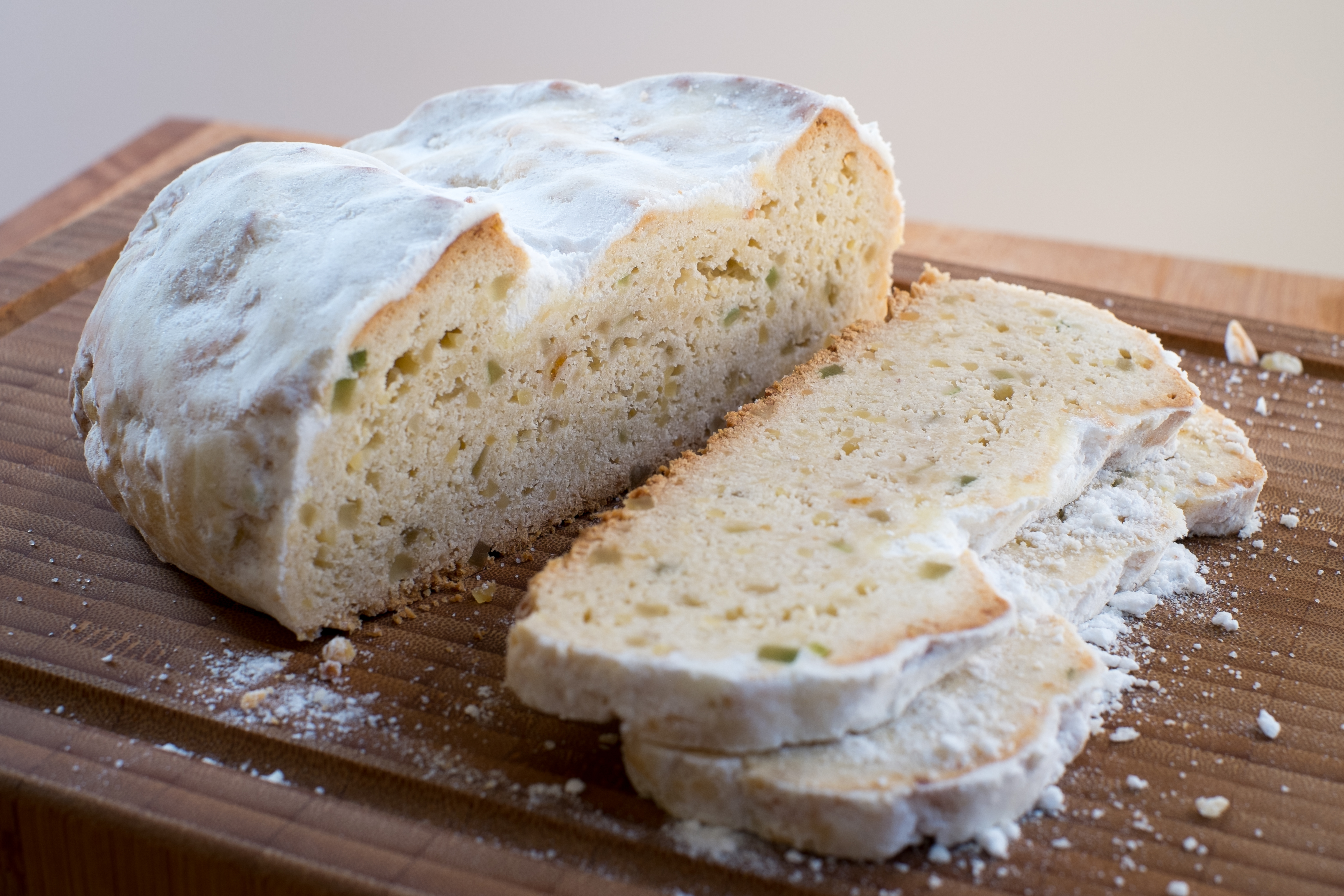 Dresdner Mandelstollen (Konditorei Maaß)